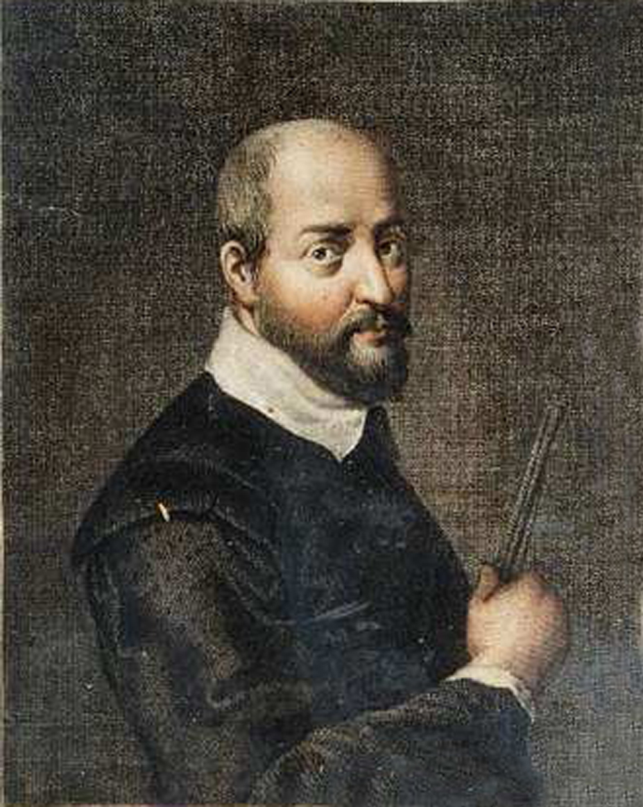 detail